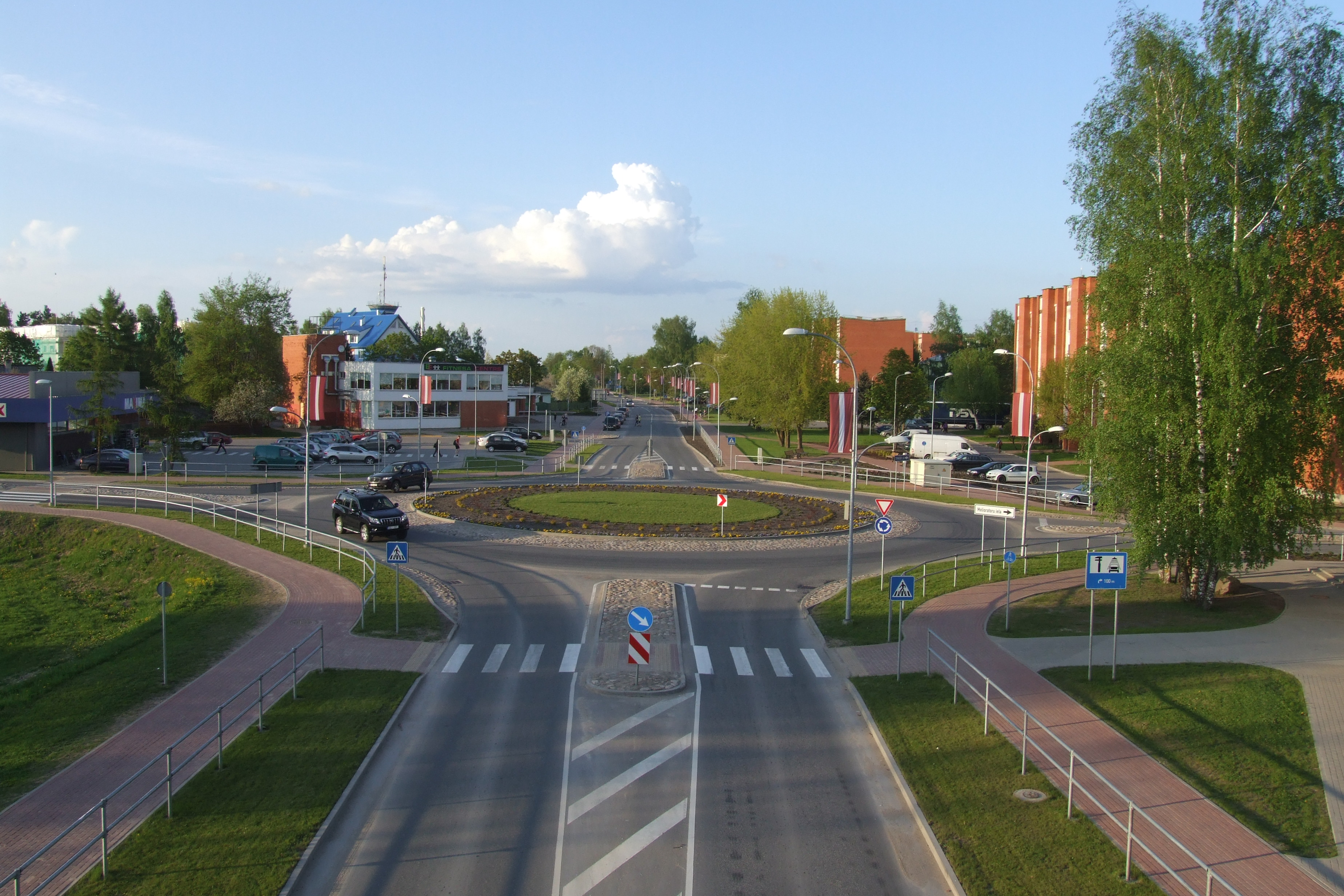 Skolas iela, 16.05.2013.